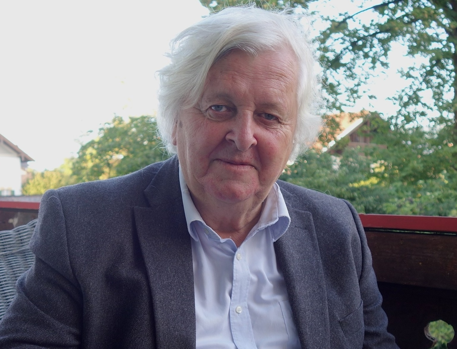 Richard von Schirach, 2017